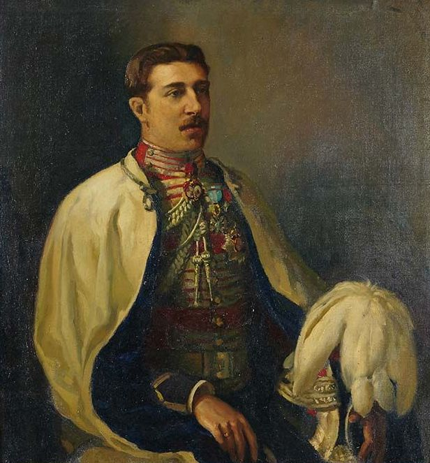 José Maria de León y Contreras. H. 1875. Atribuido a José Maria Rodriguez de Losada (1826-1896) Colección particular M. Valle de la Reina. Oleo. 100 x 95,5